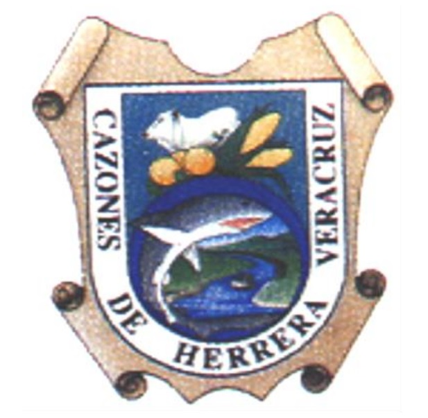 Escudo de Cazones de Herrera